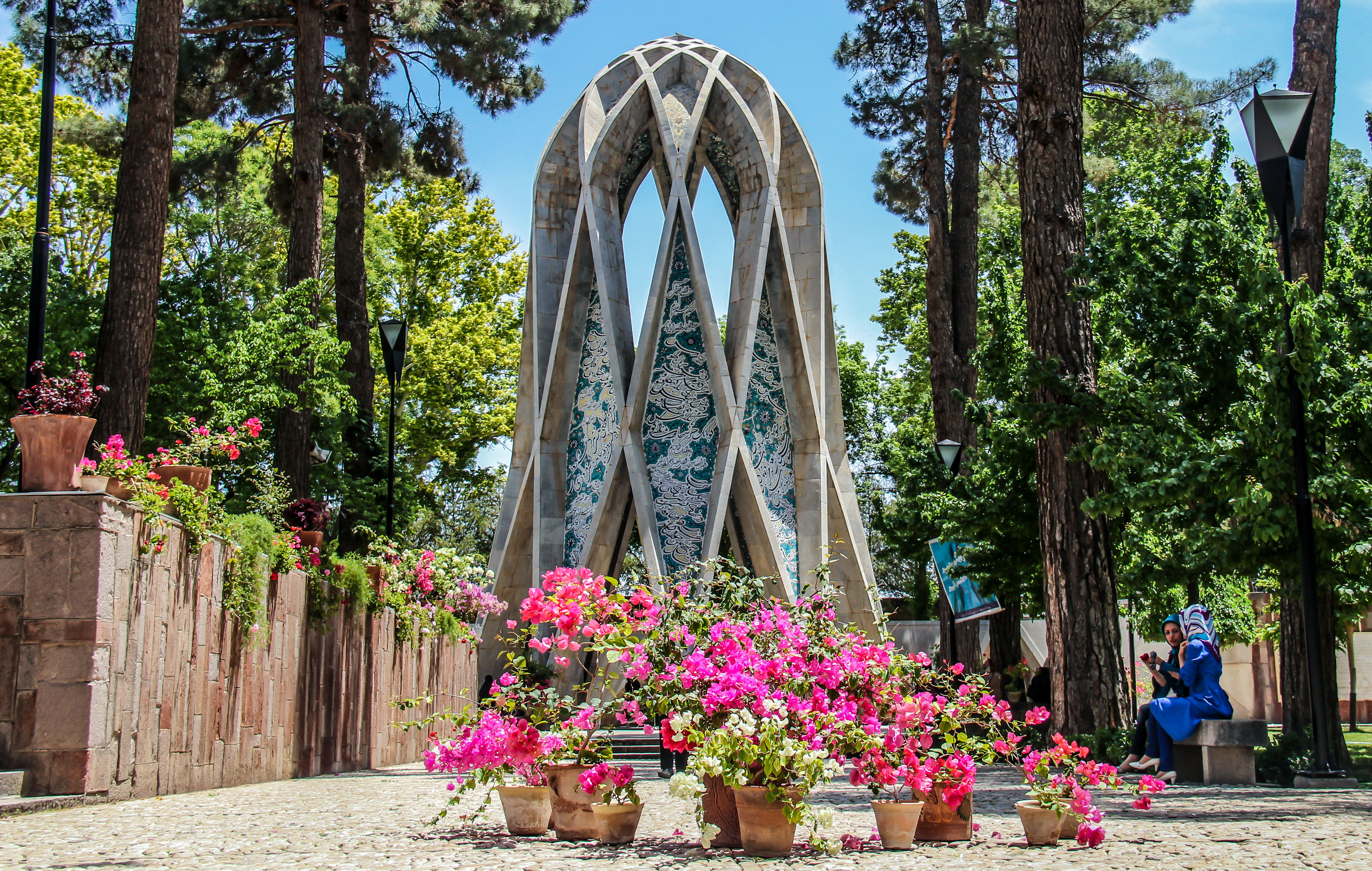 آرامگاه خیام